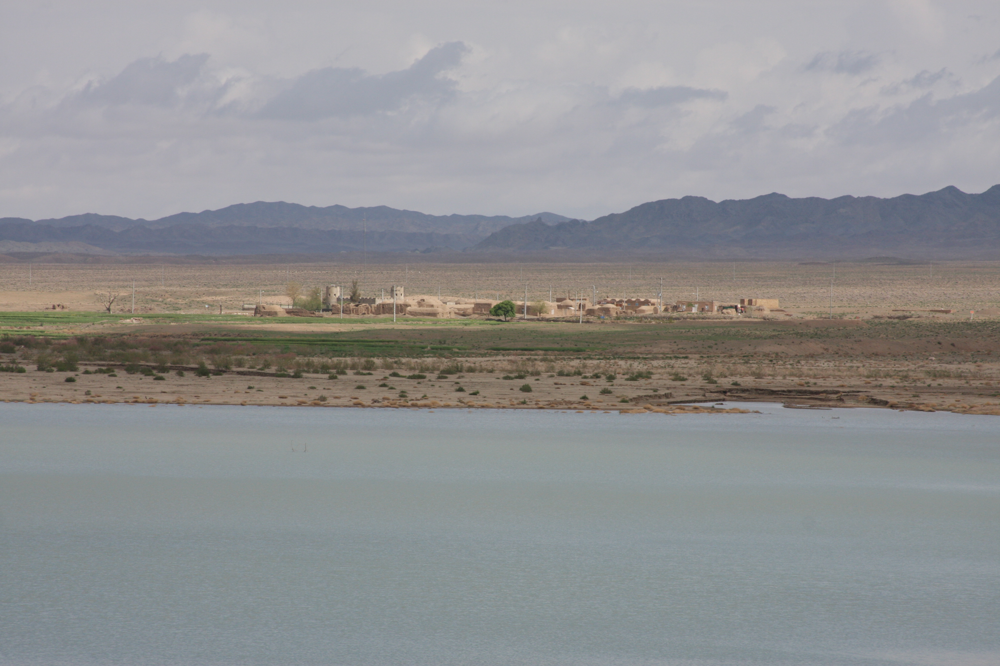 سد دهن قلعه Alamout (بحث) ۲۴ سپتامبر ۲۰۱۱، ساعت ۰۲:۱۱ (UTC)Farhad Abdollahi